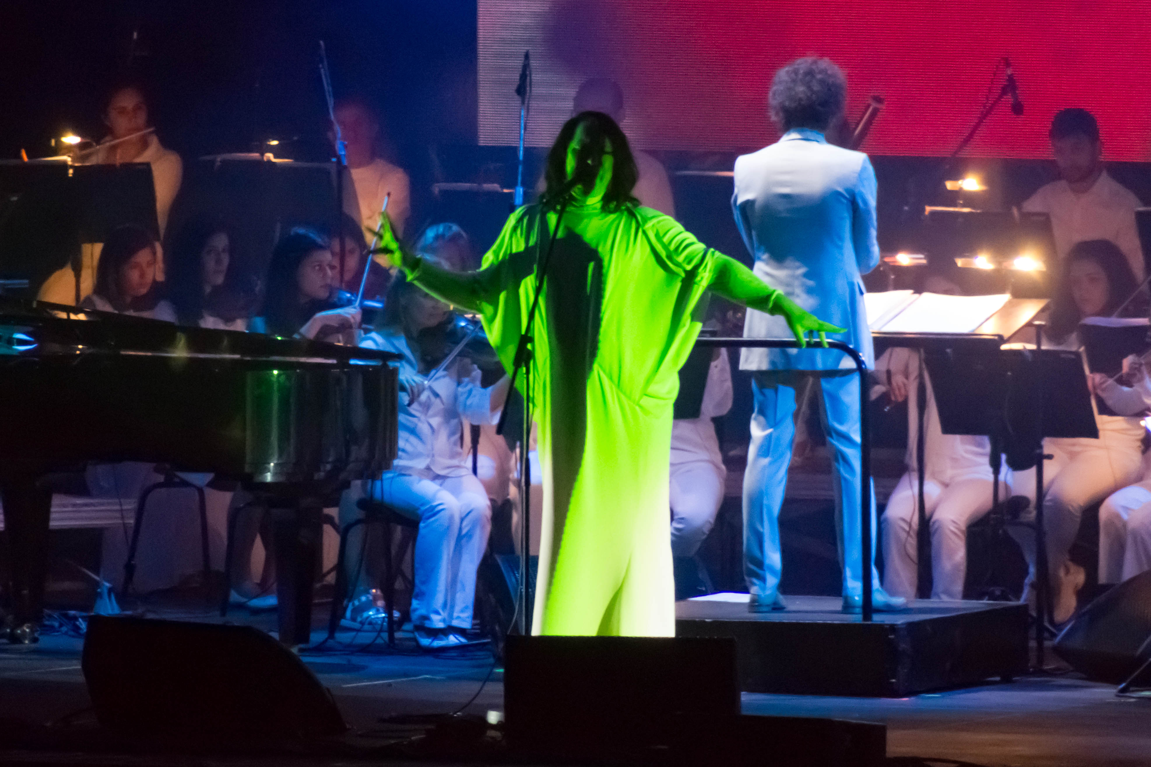 Antony and The Johnsons no NOS Primavera Sound 2015 de Porto.